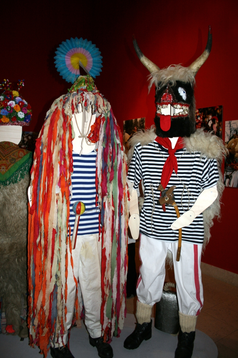 Maske žejanskog i halubajskog zvončara snimljeni tijekom Noći muzeja u Etnografskom muzeju u Zagrebu